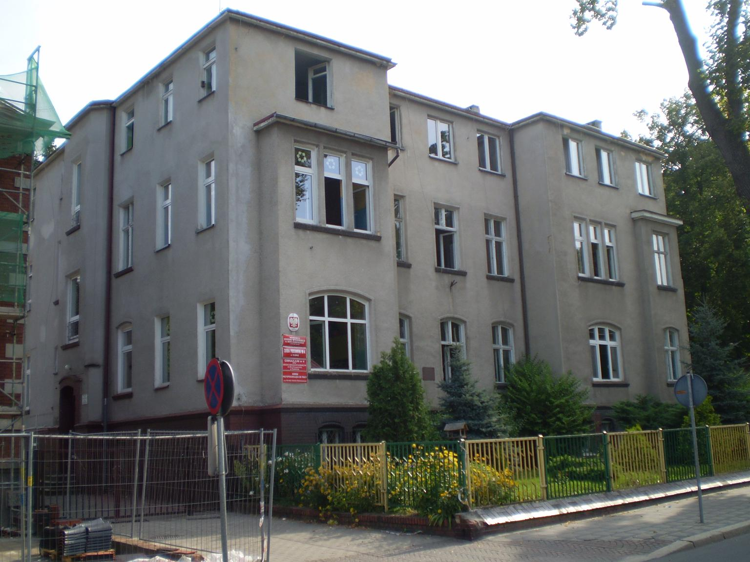 szkoła podstawowa nr. 5 w Gubinie